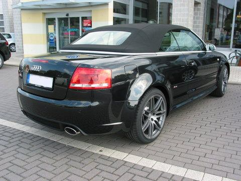 Audi RS4